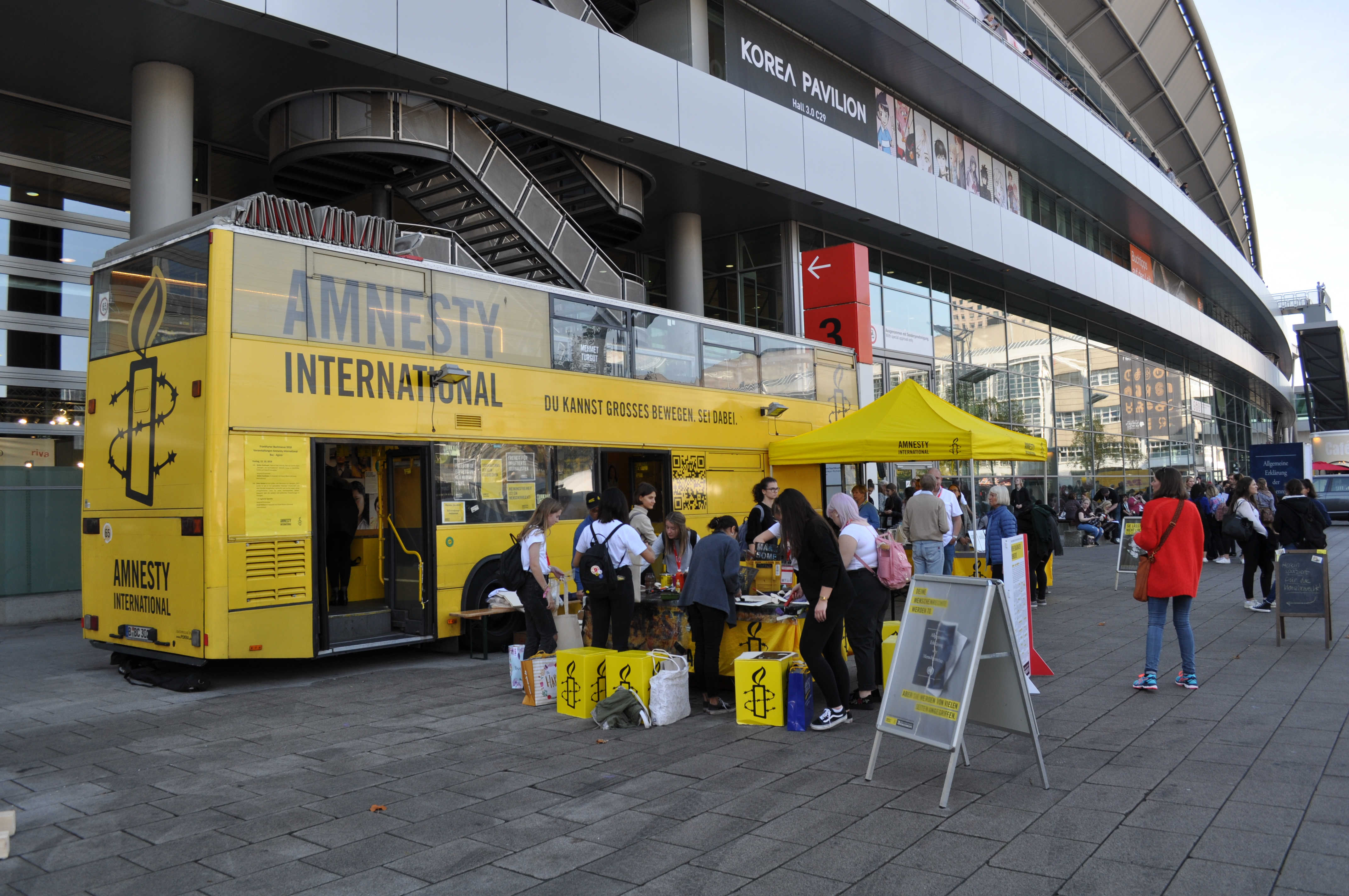 AI Frankfurter Buchmesse 2018